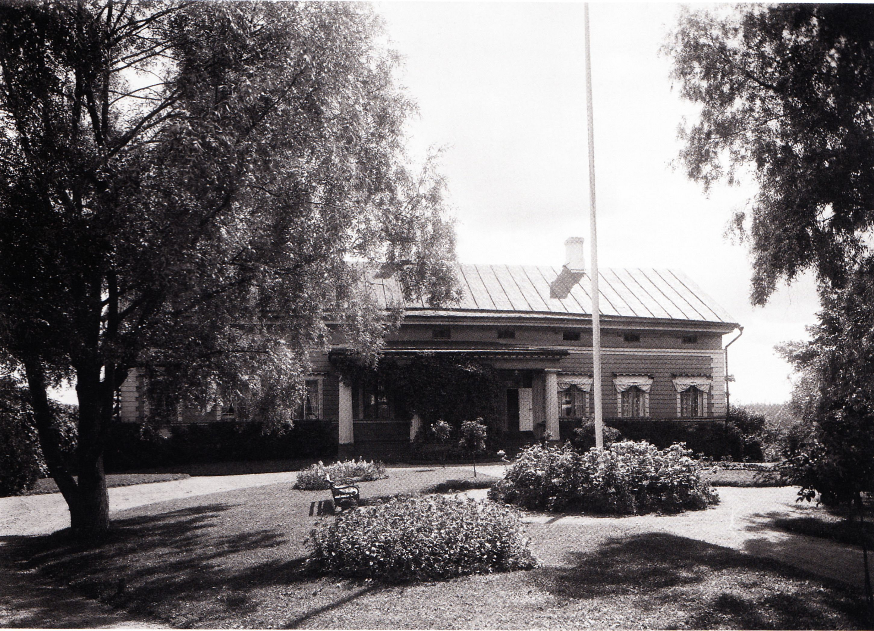 Tervalammen kartano vuonna 1915